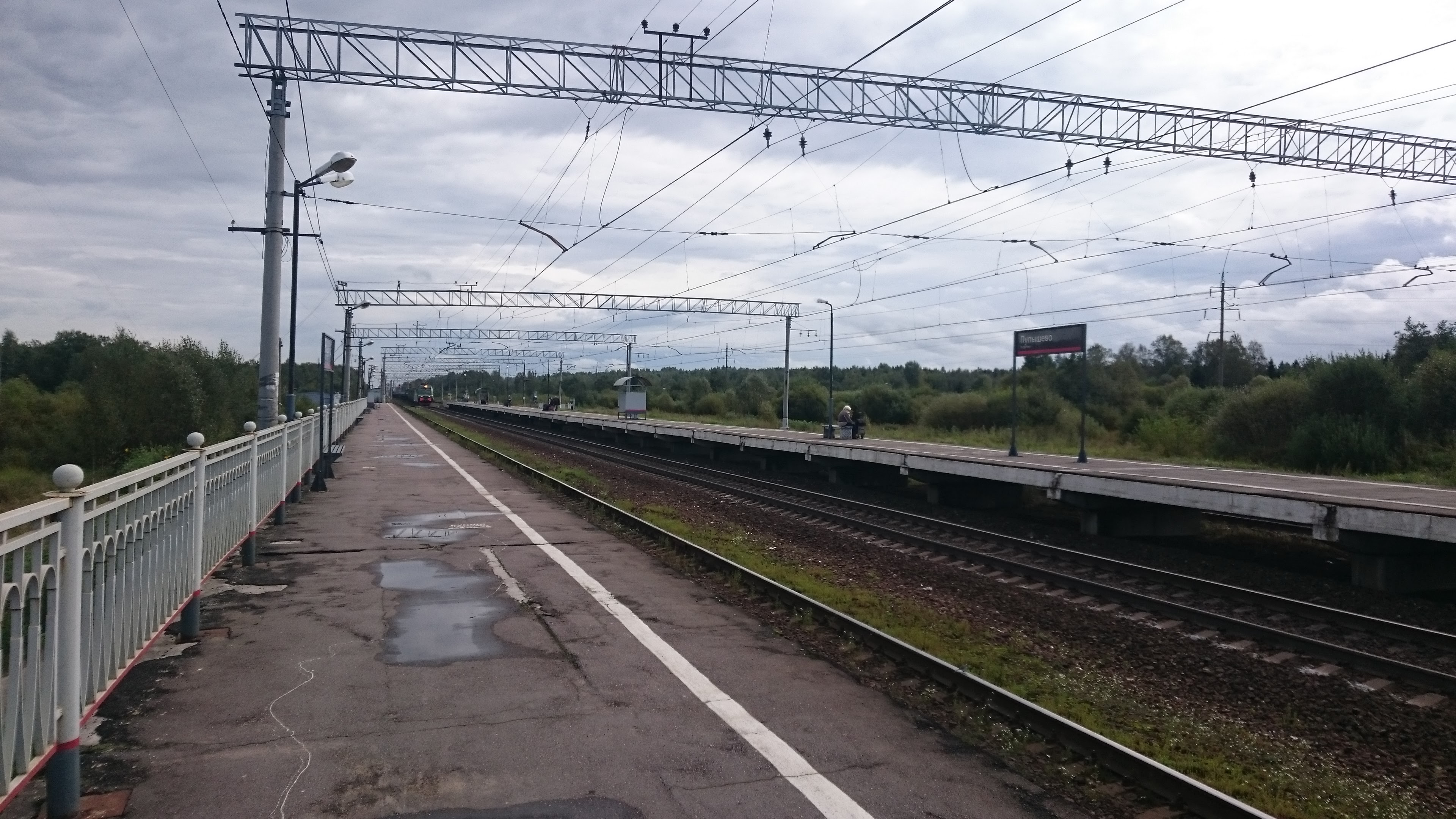 Платформа Пупышево, август 2016